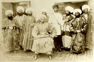 Сеид Мир Сиддик-хан (Хишмат), сын эмира Музаффара. Бухарский эмират. Чарджуйский бек.